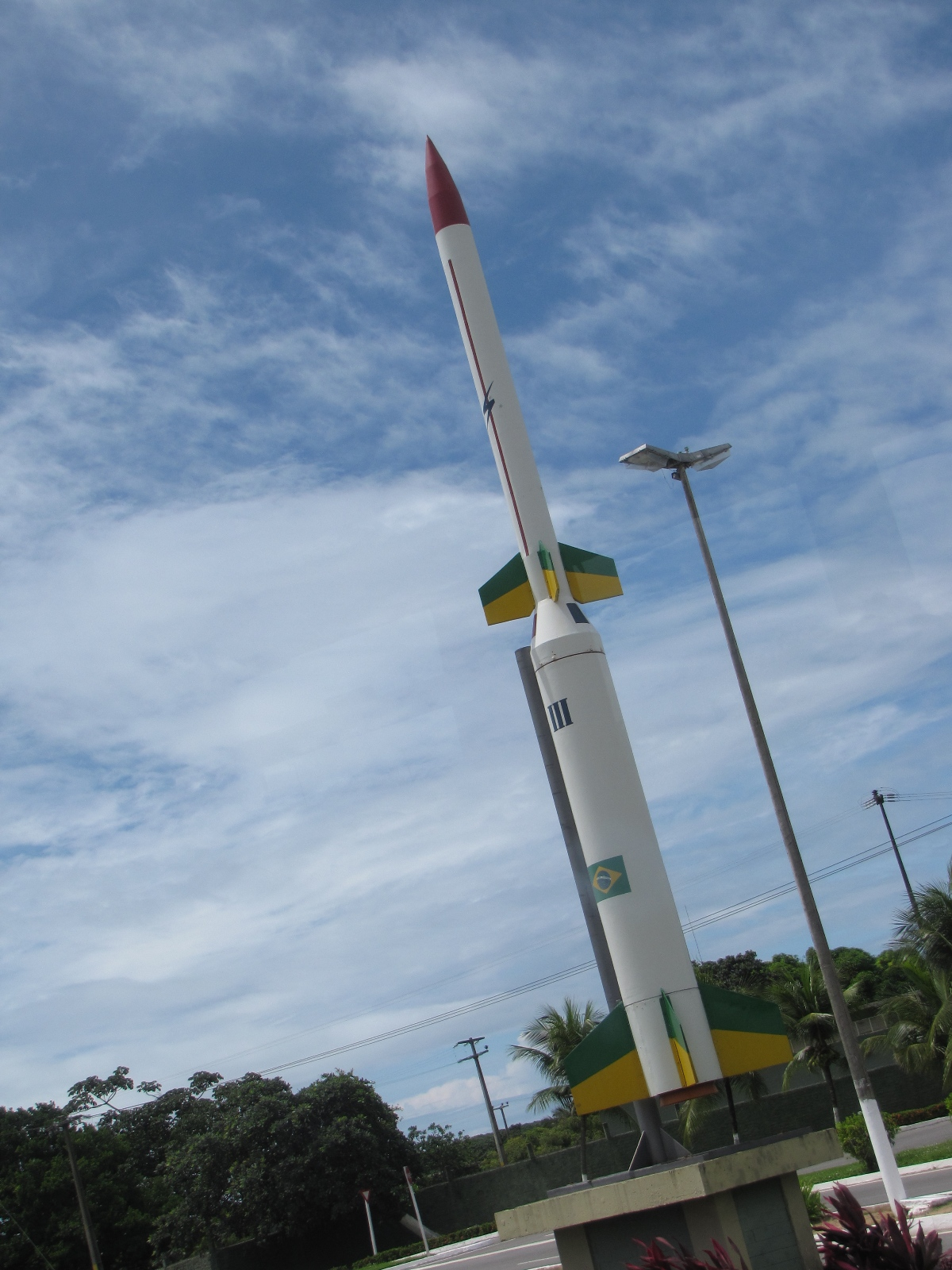 Foguete do Centro de Lançamento da Barreira do Inferno em Natal/RN/Brasil.